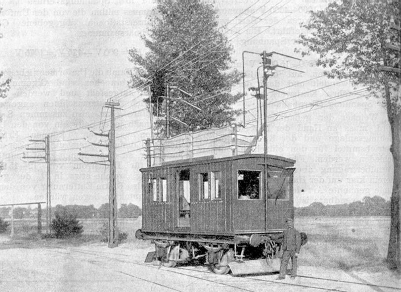 Transformatorwagen der Drehstrom-Versuchsstrecke Groß-Lichterfelde–Zehlendorf